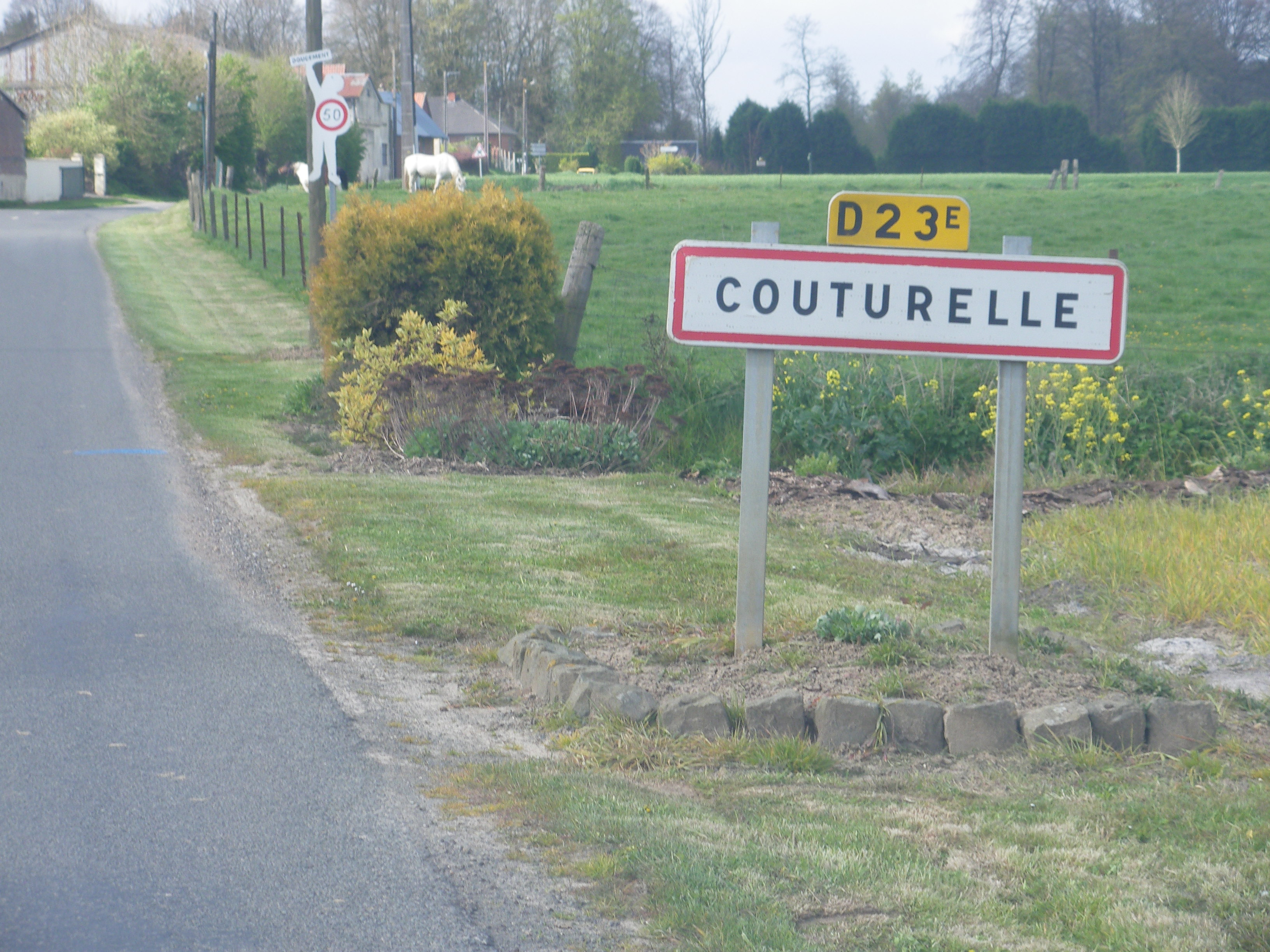 Vue d'une entrée de la commune de Couturelle.